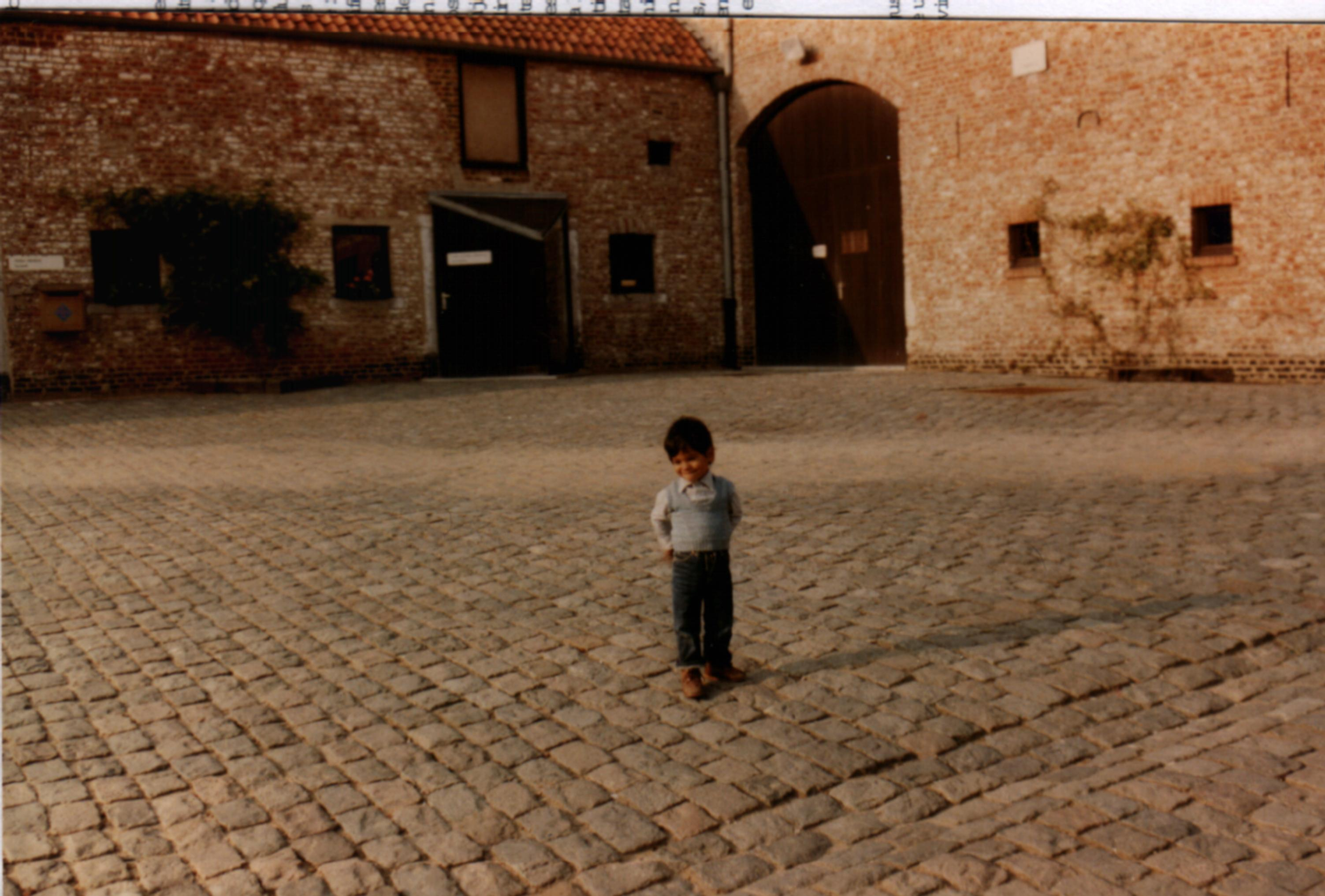 Ferme de Blocry en L'Hocaille, Lovaina-la-Nueva en Bélgica (Belgium) . La foto es de 1986.